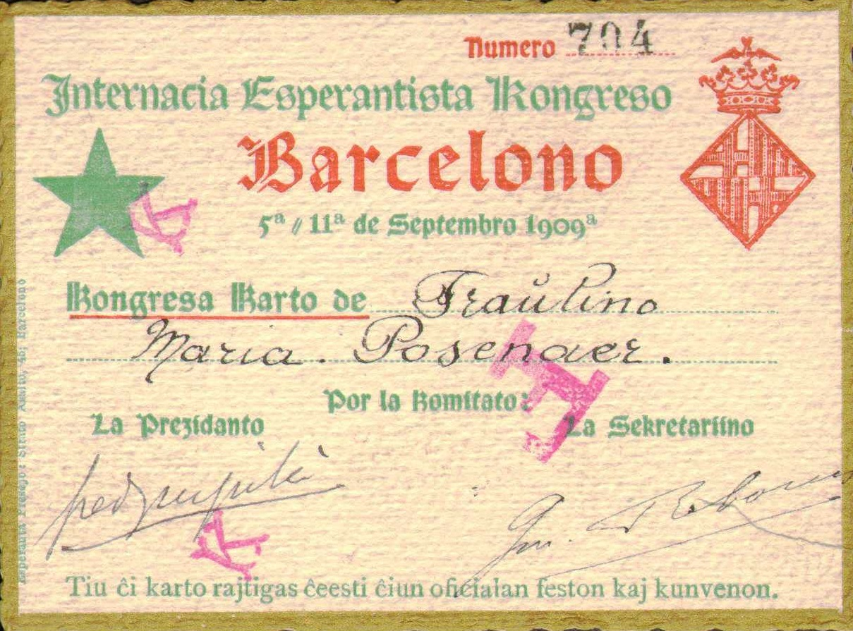 Kongresa karto de Maria Posenaer (Belgio) dum la universala kongreso de Esperanto en Barcelona, 1-11 septembro 1909